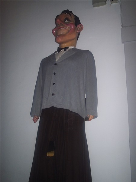 Gigantes de Alcalá de Henares